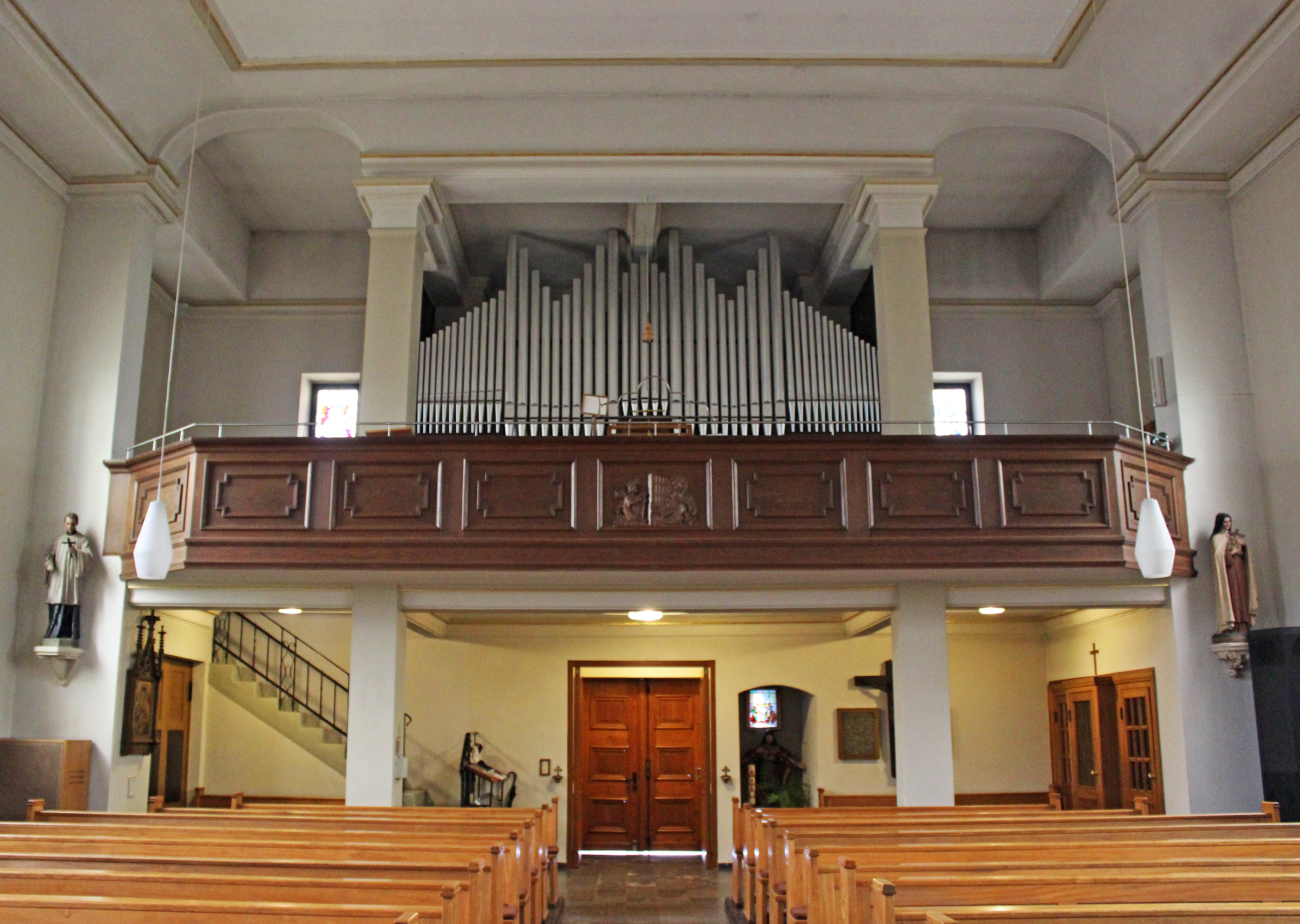 Blick ins Innere der katholischen Pfarrkirche St. Antonius in Werbeln, Gemeinde Wadgassen, Landkreis Saarlouis, Saarland